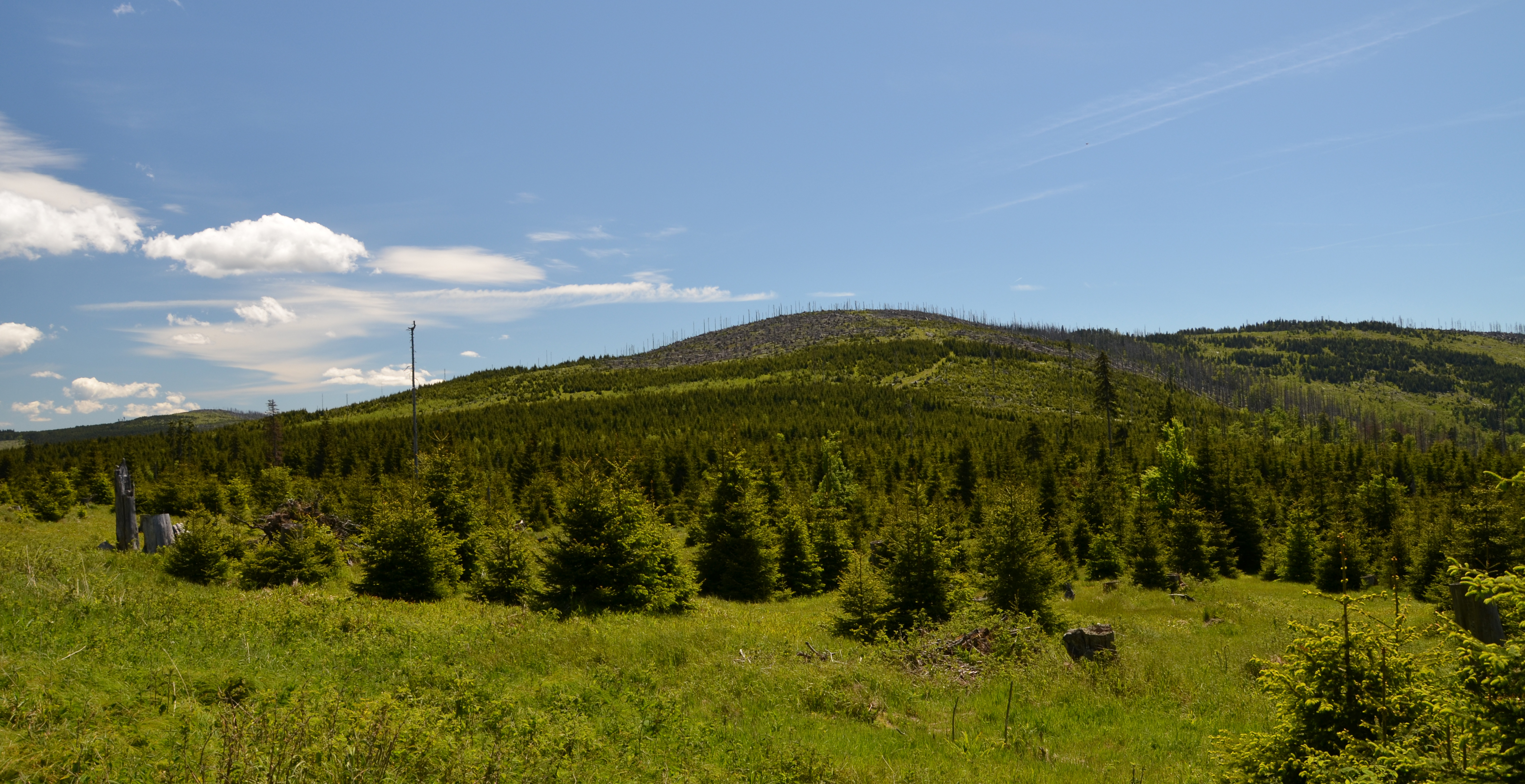 Plesná (Lackenberg, 1337 m) na Šumavě a v Bavorském lese, pohled ze SZ, vlevo v pozadí Ždánidla (Steindlberg, 1309 m)